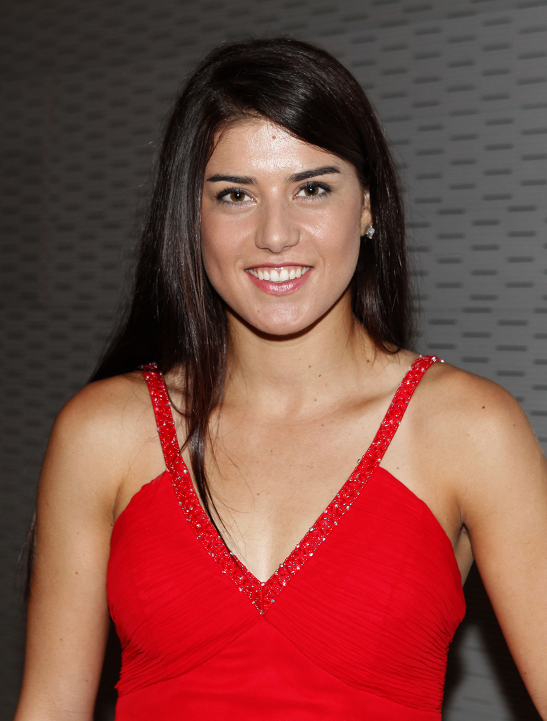 Emiliàn e rumagnòl: La Sorana Cîrstea tòlta śò in d'l Utóbar dal 2011